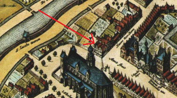 Uitsnede van het Johannietershuis